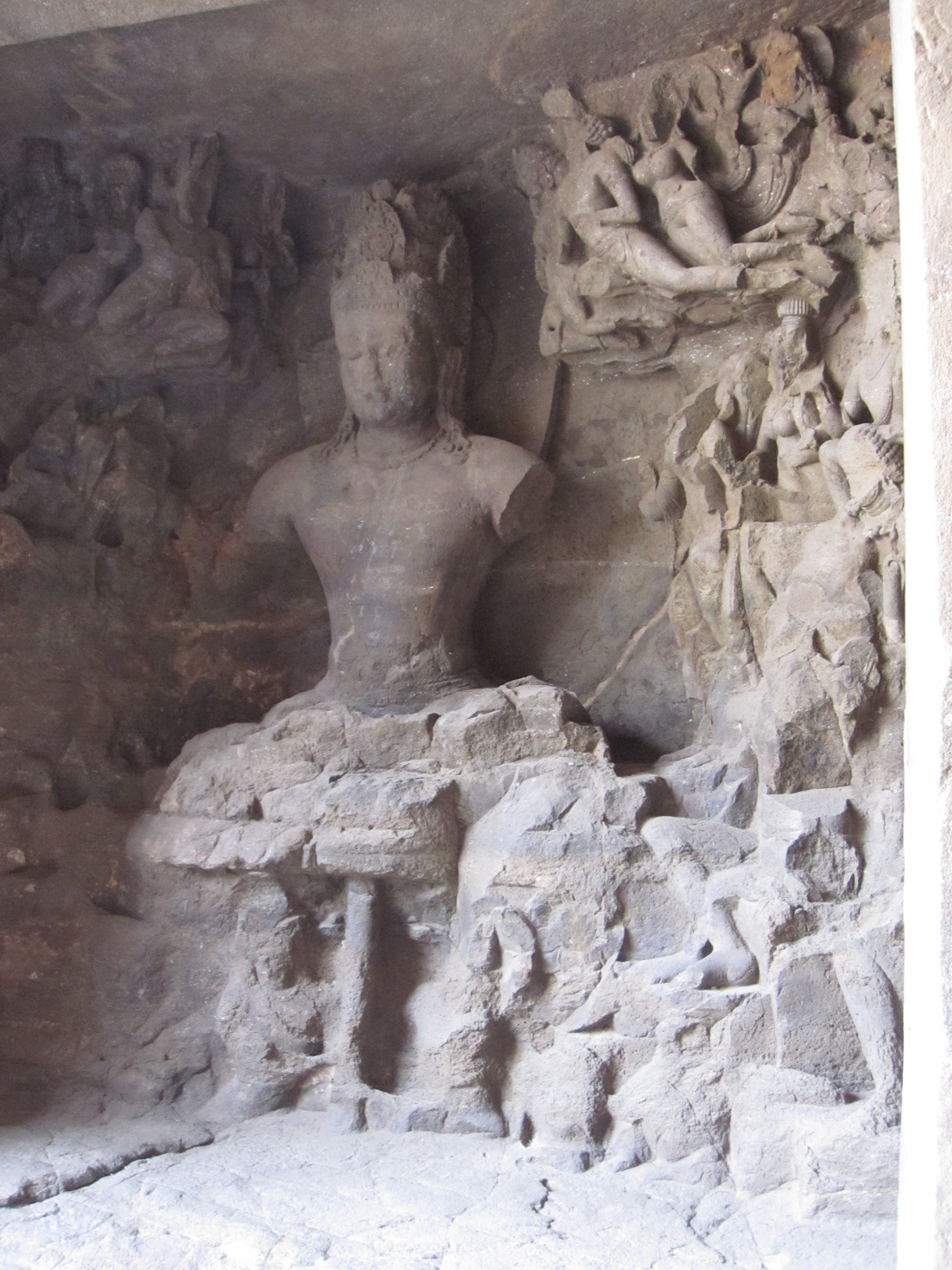 Gharapuri Hindu cave temples, Mumbai harbor